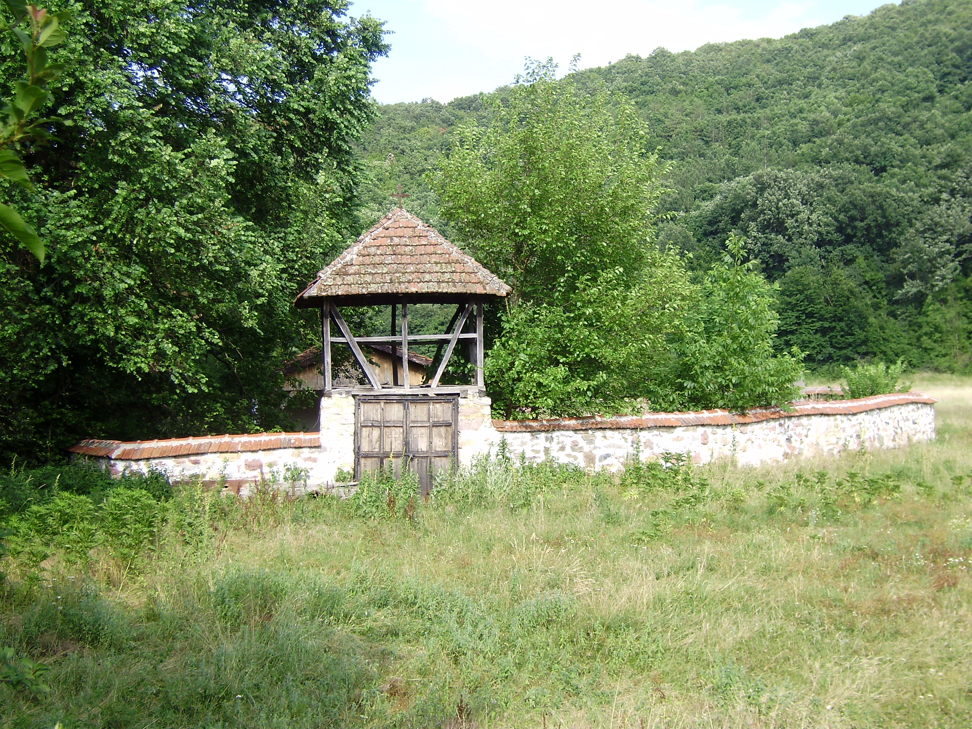 Параклис „Св. Богородица" в село Протопопинци